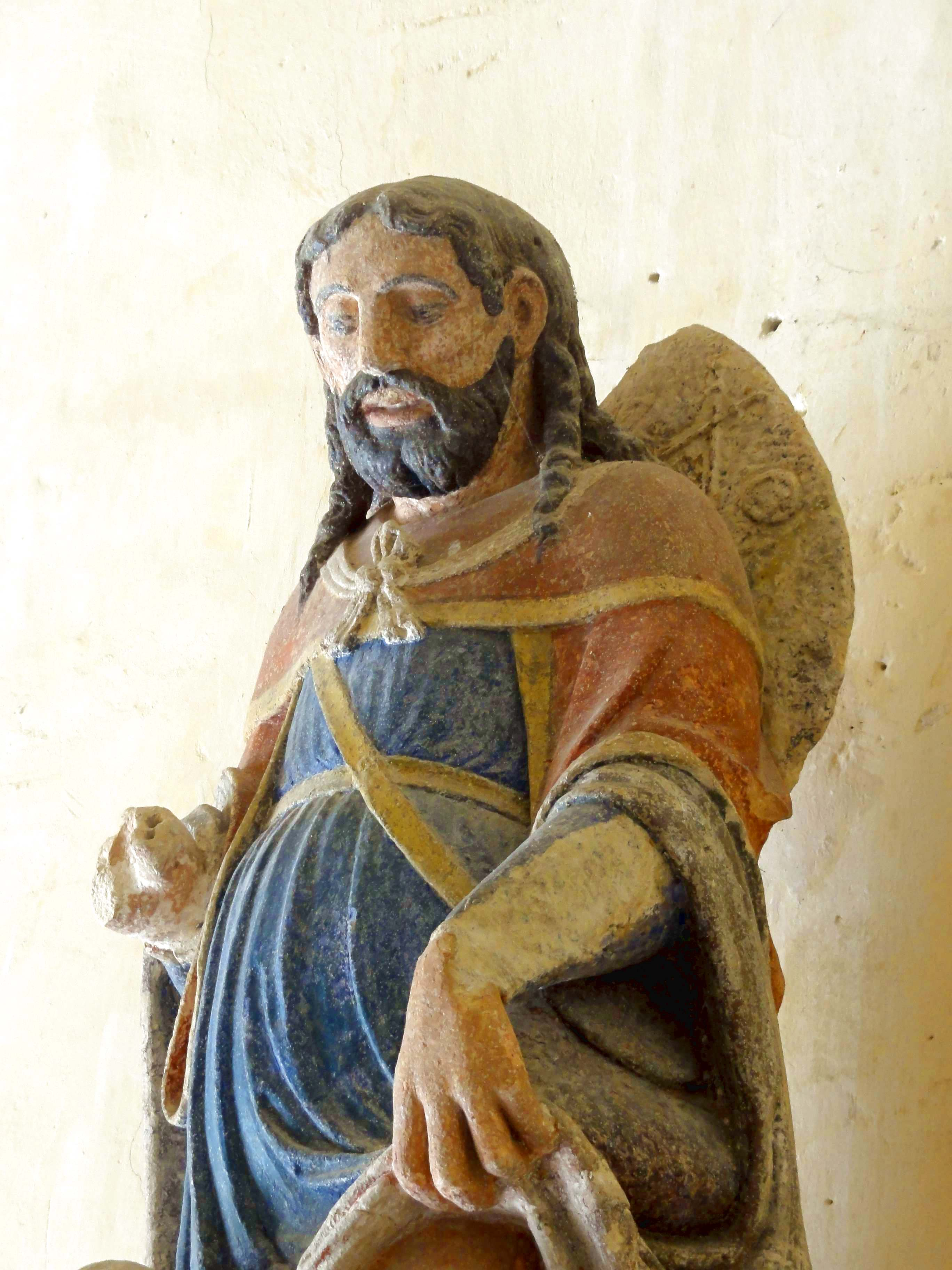 Statue de saint Roch dans l'église Saint-Martin d'Omerville. Il porte une aumônière en bandoulière.